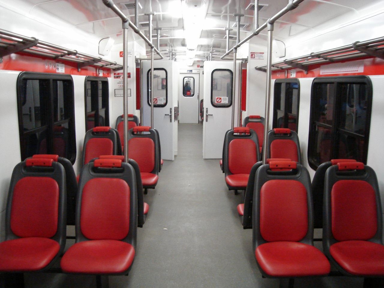 Interior de un coche local de clase única FIAT Materfer de trocha métrica perteneciente a la línea Belgrano Norte del Ferrocarril Belgrano, reformado por EMEPA y operado por Ferrovías.